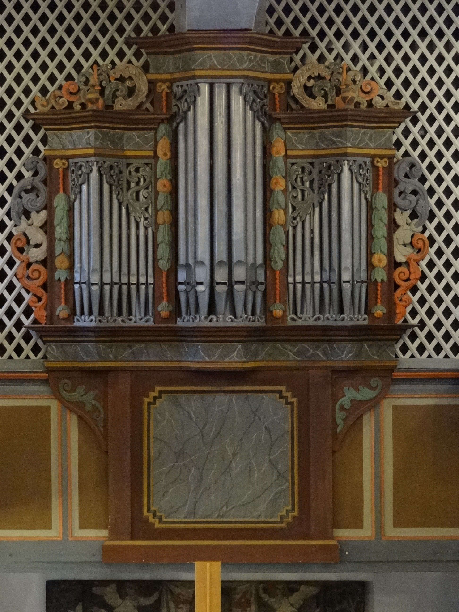 Evangelische Kirche Dornholzhausen